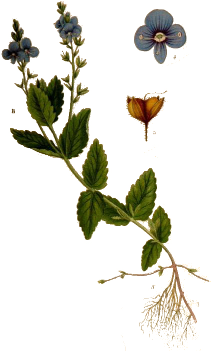 Veronica chamaedrys 3 växten i blom, 4 blomma (2/1), 5 blomfoder och fröhus från höger sida (3/1)